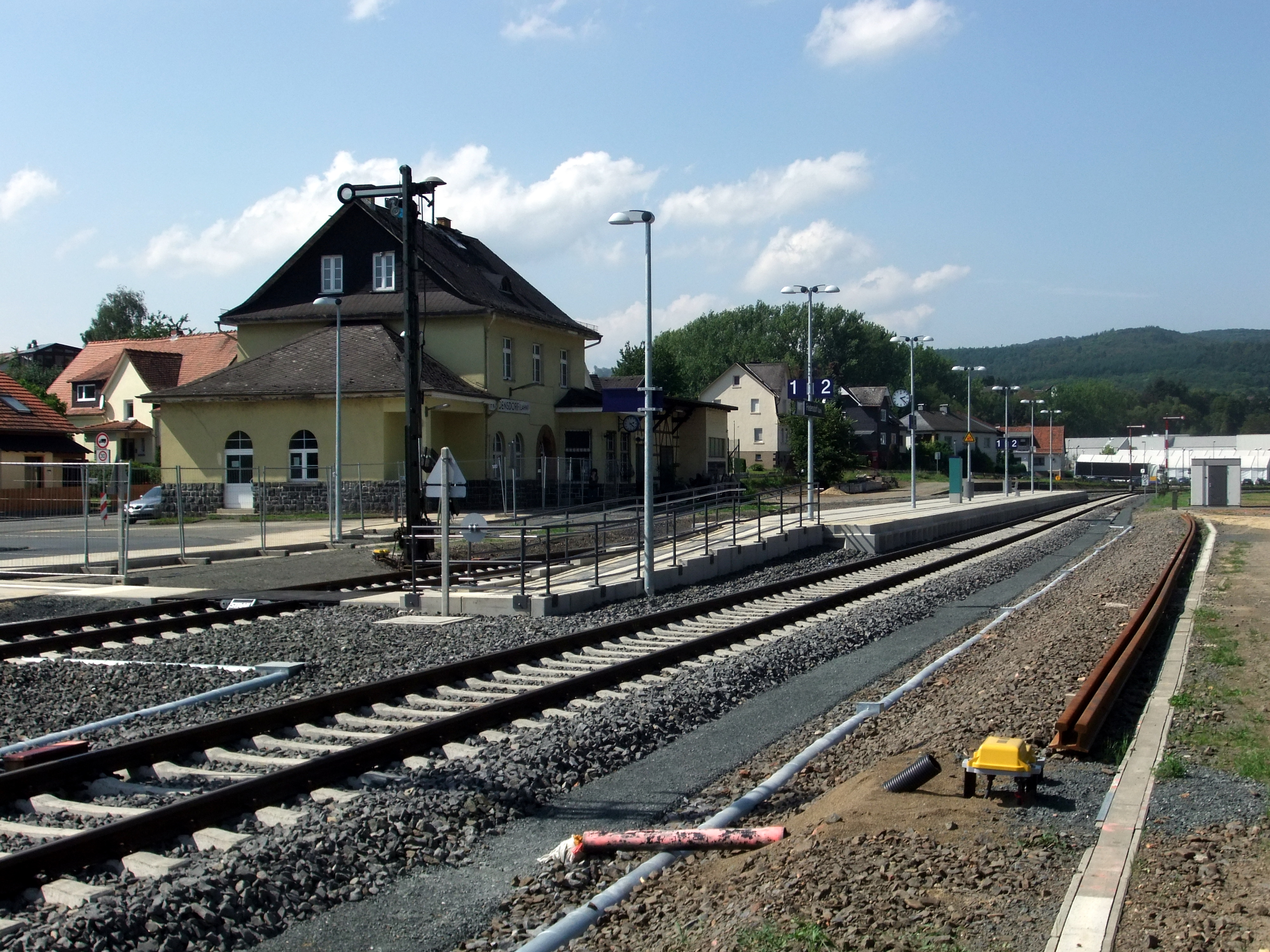 Bahnhof Friedensdorf (Lahn) nach Umbau 2011